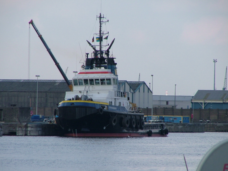 Tugboat